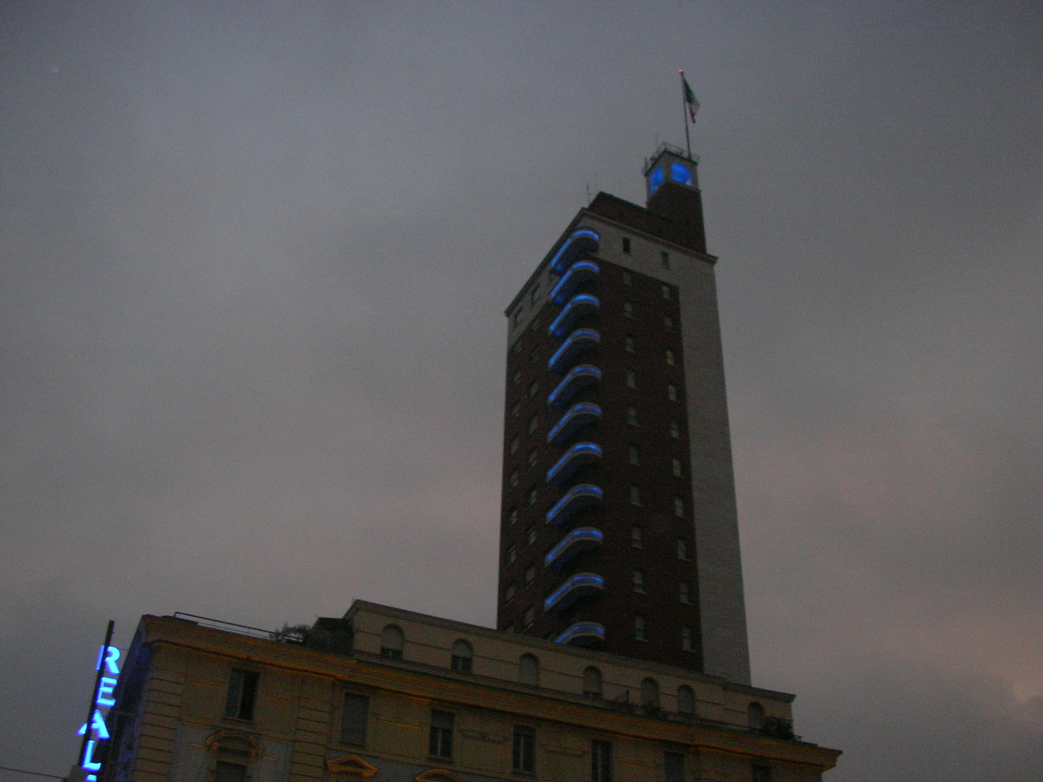 La Torre Littoria illuminata in una sera di novembre